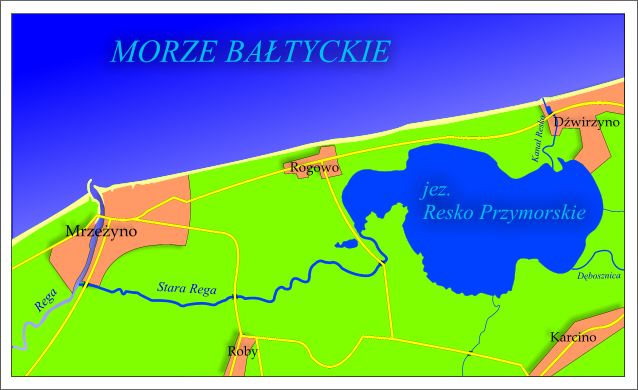 Mapka okolic jeziora Resko Przymorskie